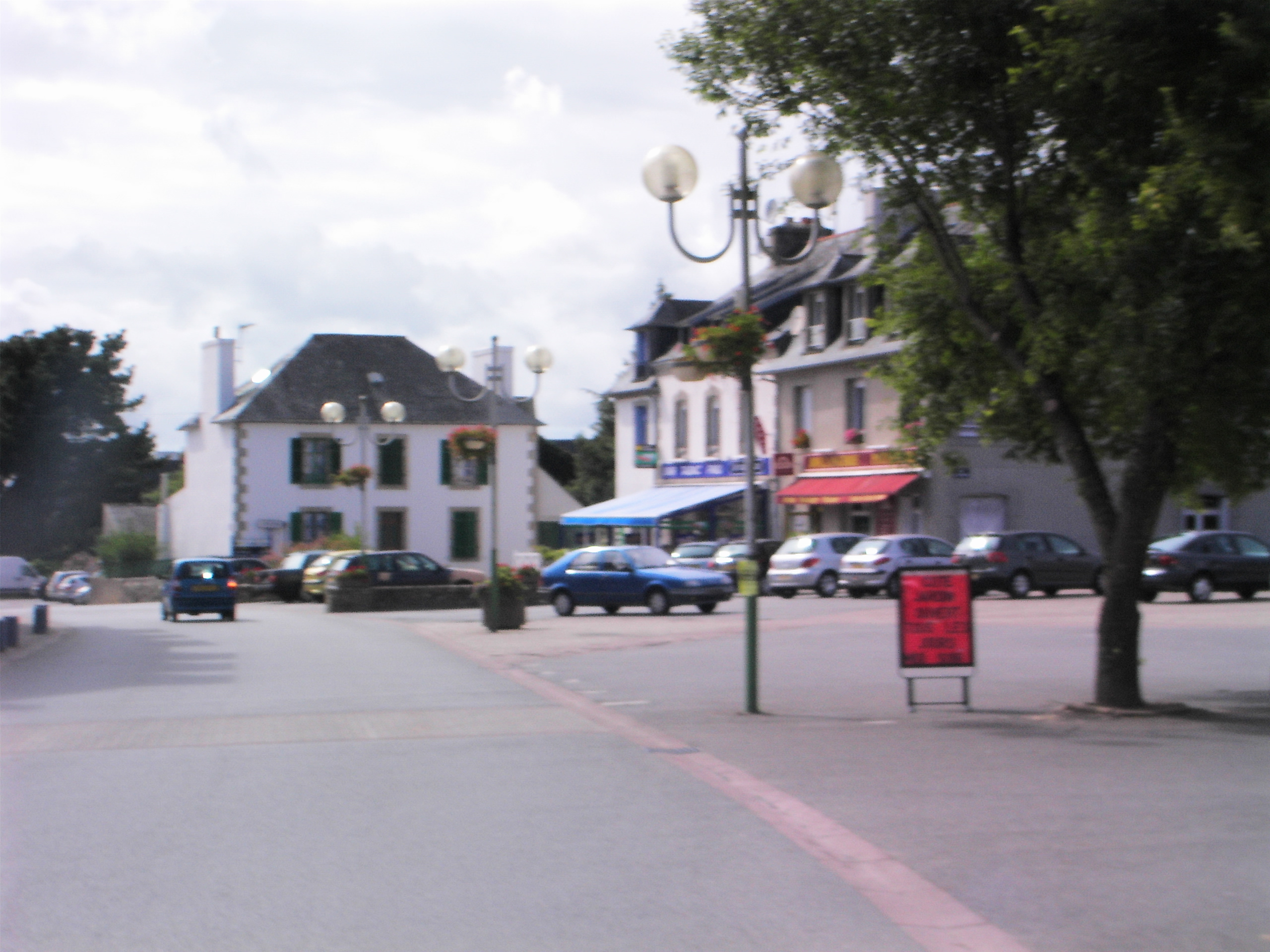 Telgruc-sur-Mer le 17 août 2007, France.